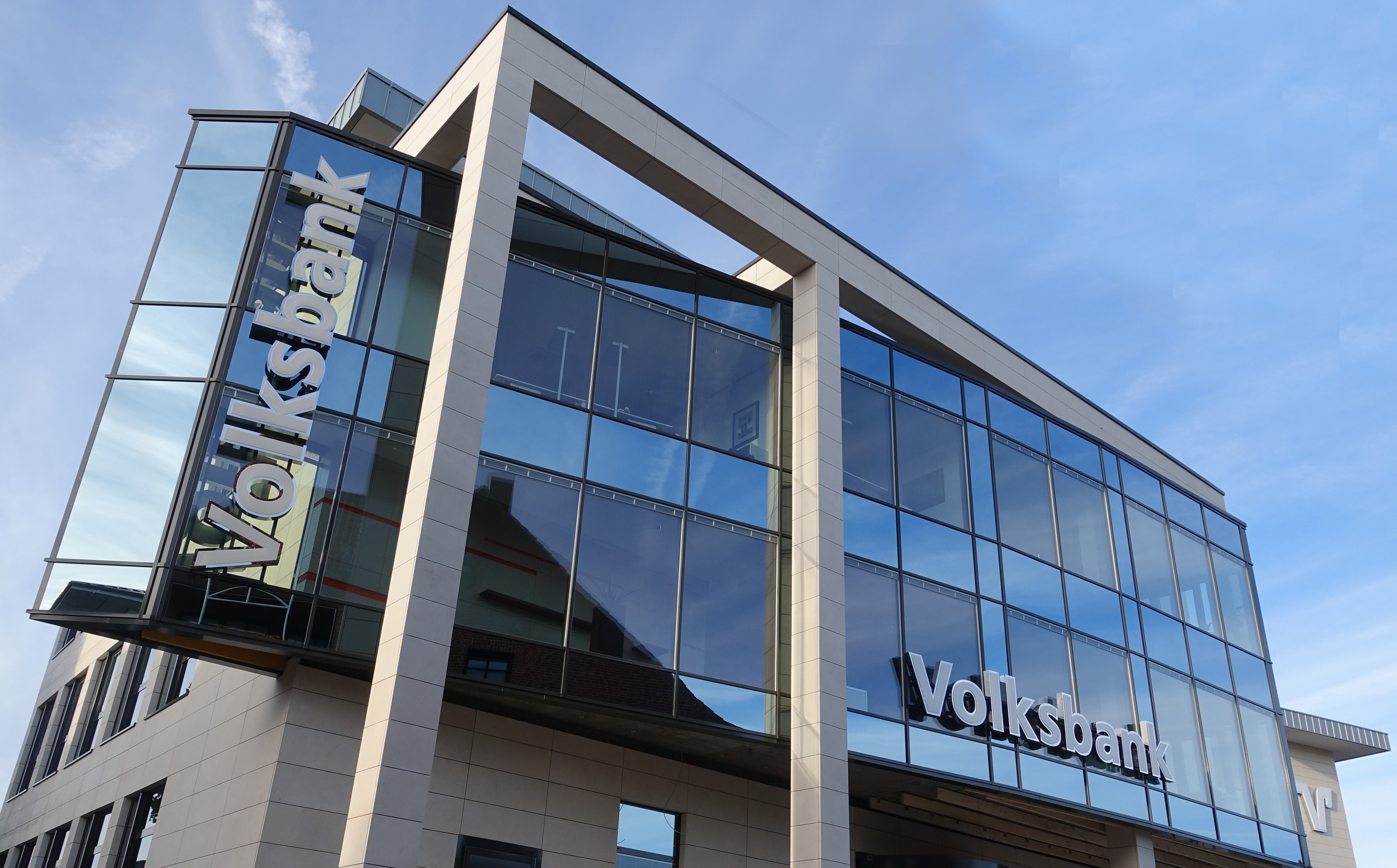 Gebäude der Hauptstelle, Volksbank Osterholz-Scharmbeck